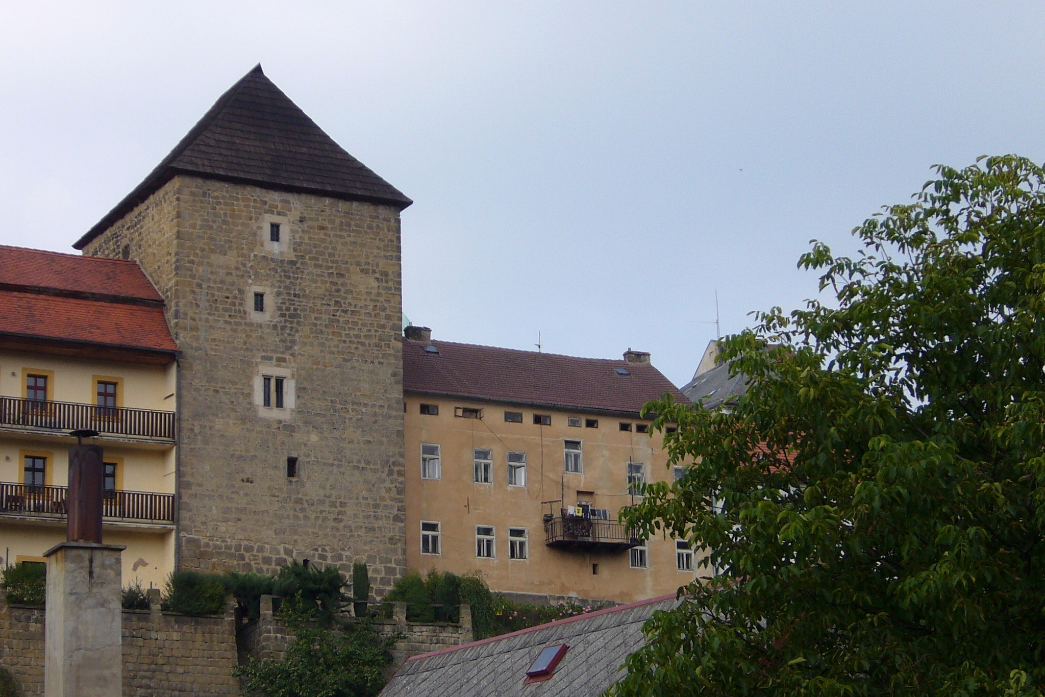 Pikartská věž, Hrad Úštěk, Panský dvůr 3 a 86, Úštěk.